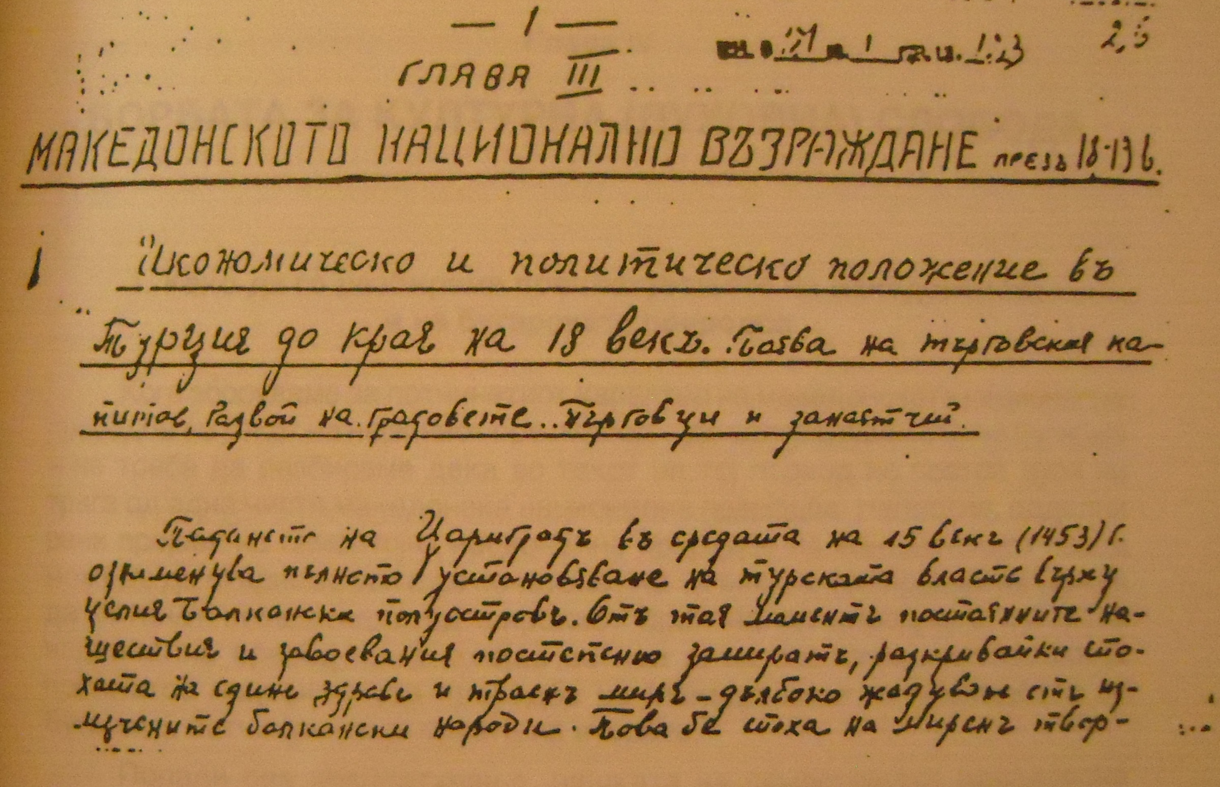 Глава на Васил Ивановски в ръкописа „Македонският въпрос в миналото и днес“.